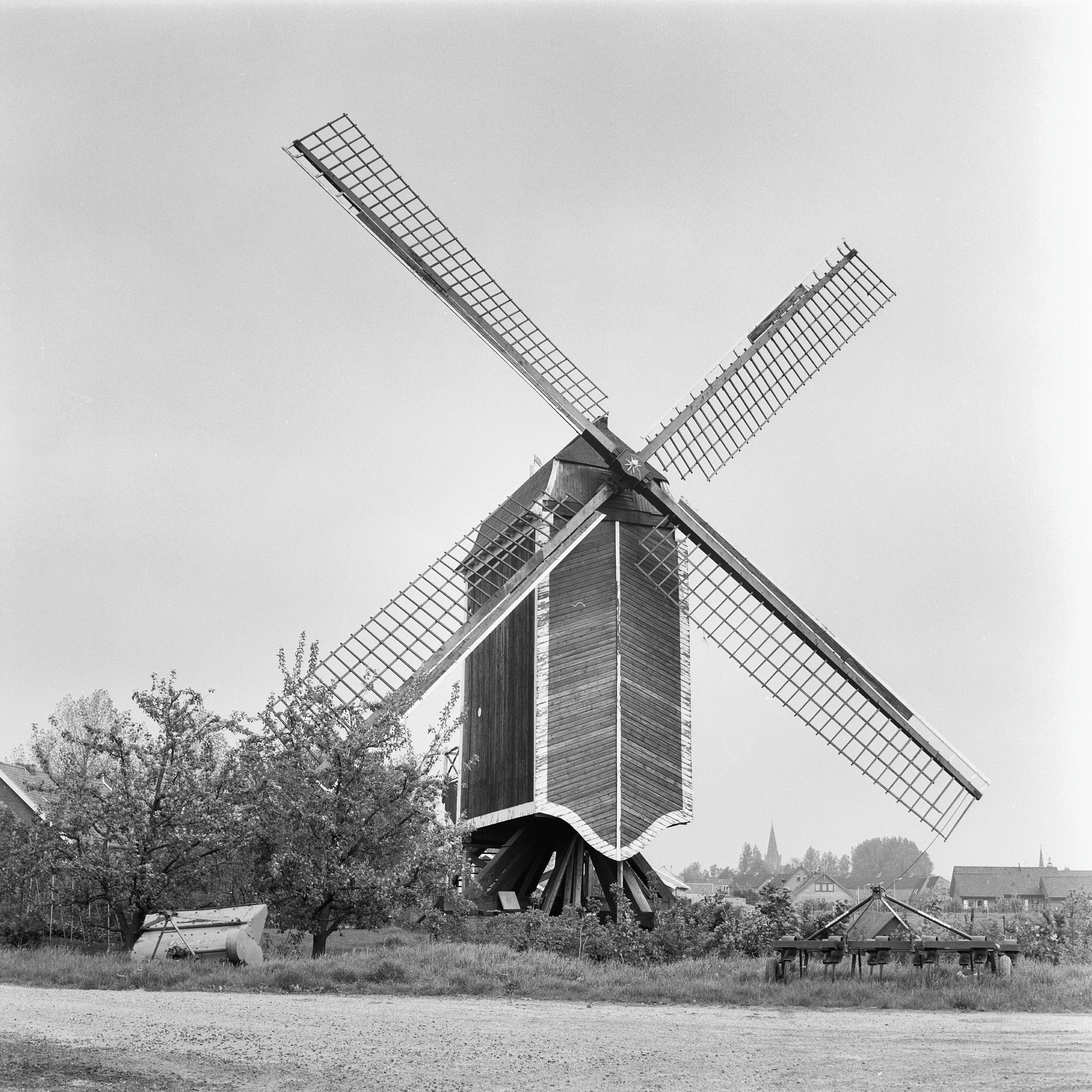 Diversen: standerdmolen "De Hoed", exterieur